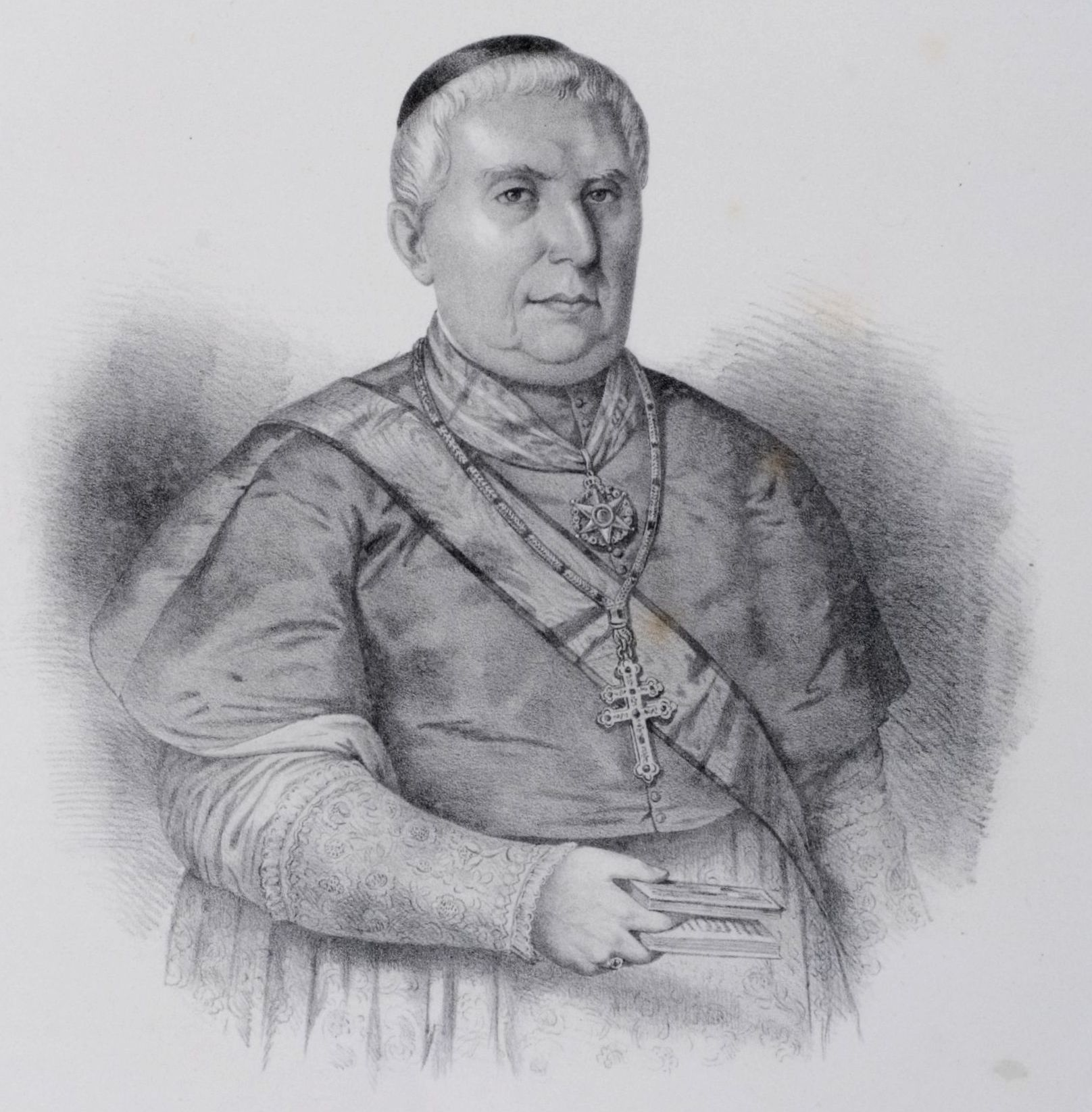 Litografia em preto e branco